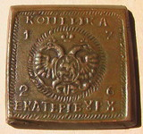 копейка 1726 года